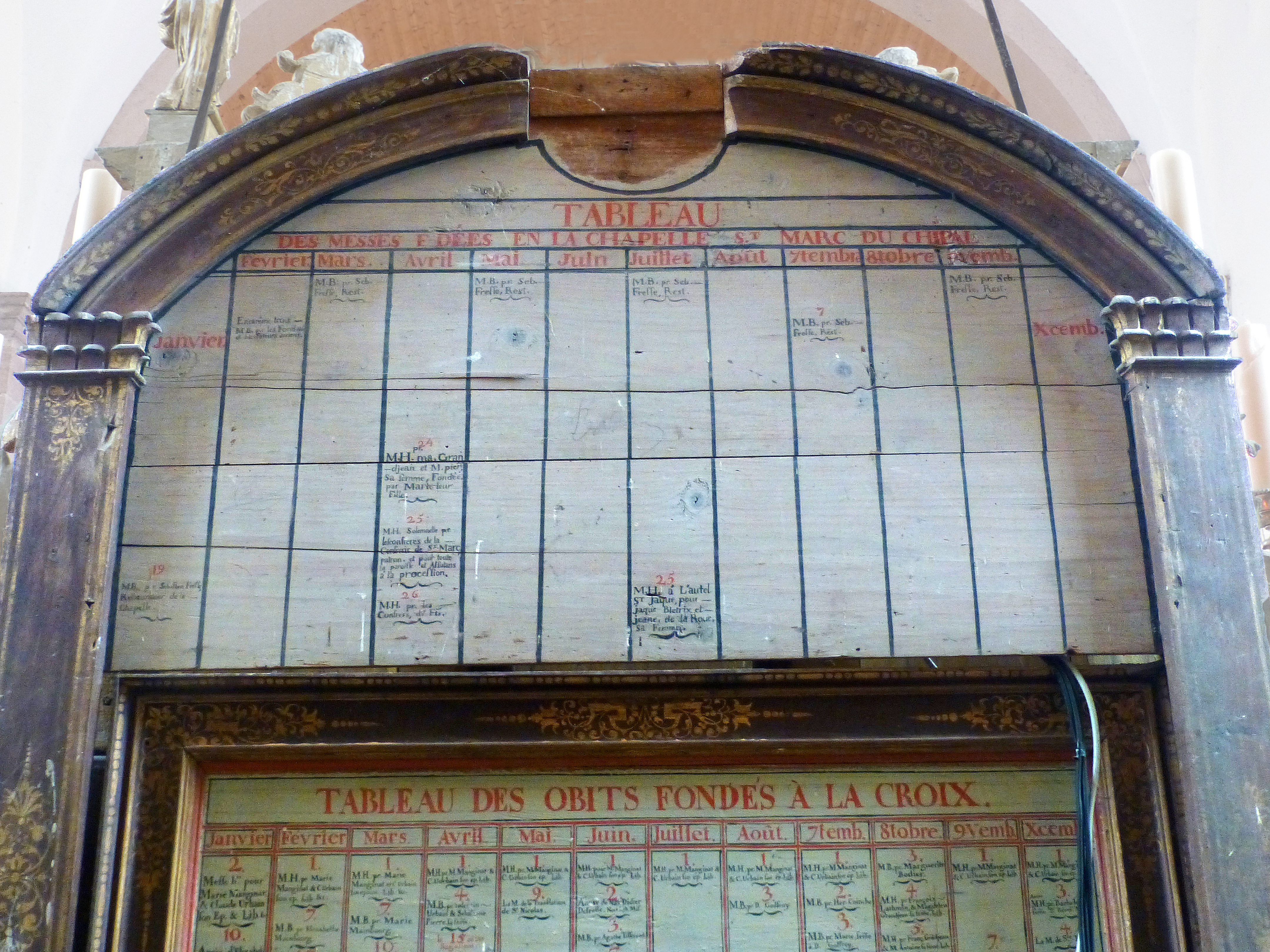 Tableau des "obits" à l'église Saint-Nicolas de La Croix-aux-Mines (Vosges). Daté du XVIIIe s. Inscrit MH. Situés à l'arrière du maître-autel, les panneaux en bois peint consignent les messes et obits demandés par fondation à la chapelle Saint-Marc du Chipal (haut du tableau) et à l'église Saint-Nicolas. Un obit est un service religieux célébré par fondation pour un défunt à la date anniversaire de sa mort. Signification des abréviations : MB : messe basse MH : messe haute Pr : pour Noct. Nocturne : fait partie de l'office des matines LIB. LIbera : réponse à l'office des morts Laud. Laudes : prières liturgiques du matin, louanges.. Ils étaient les seuls recensés lors de l'inventaire des richesses artistiques de la France en 1977.